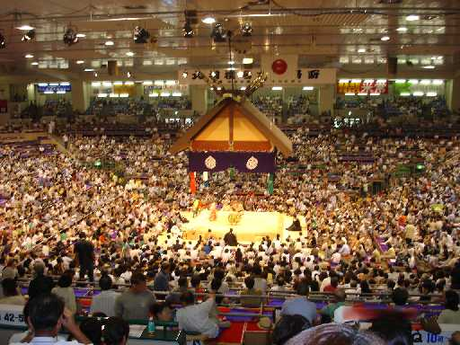 Own work. Sony, P-100